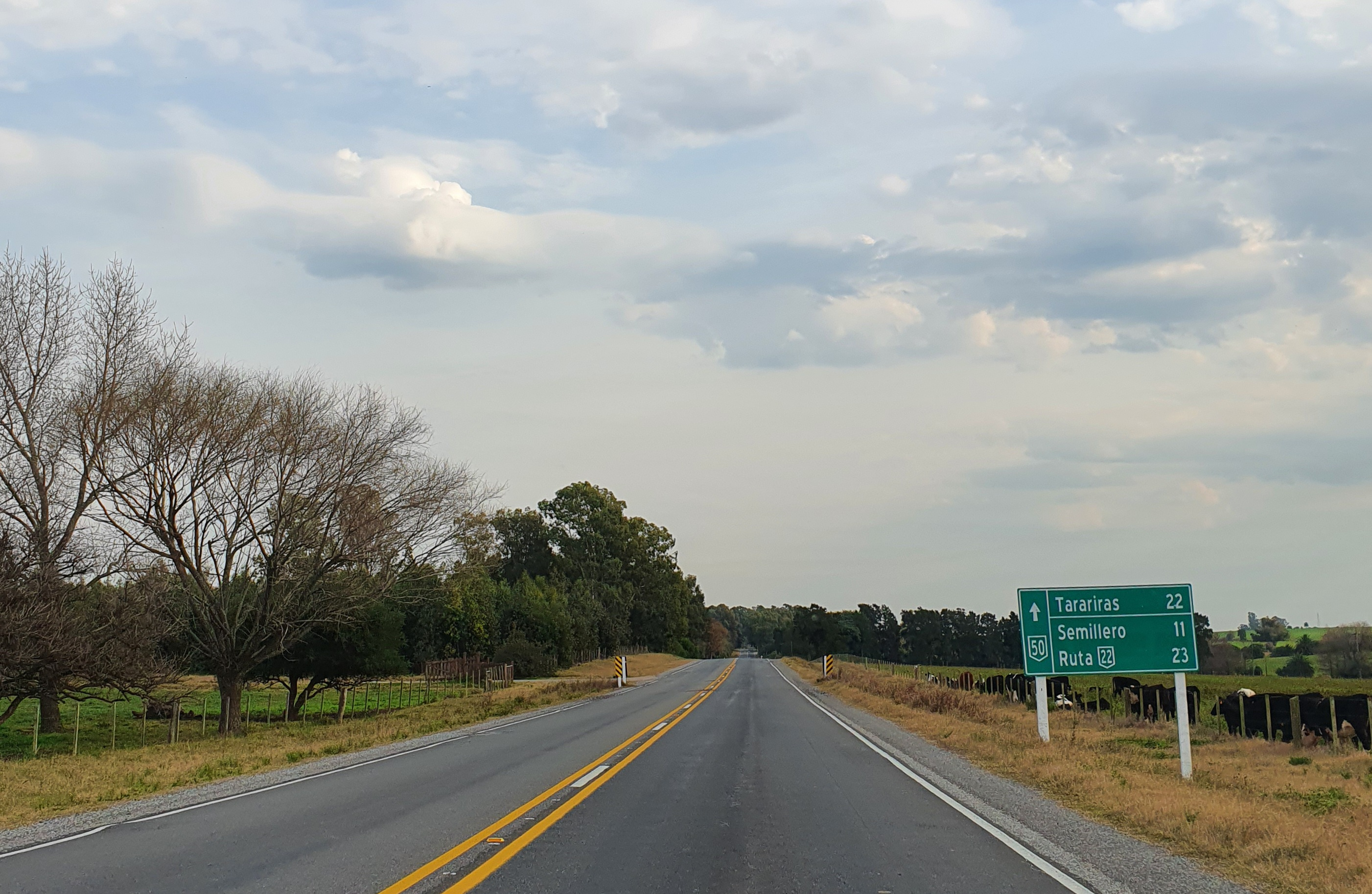 Ruta 50 sentido norte próximo a ruta 1.